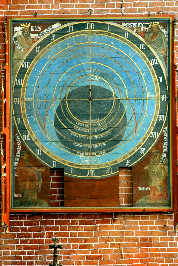 Zifferblatt der Astronomischen Uhr im Doberaner Münster (um 1398)